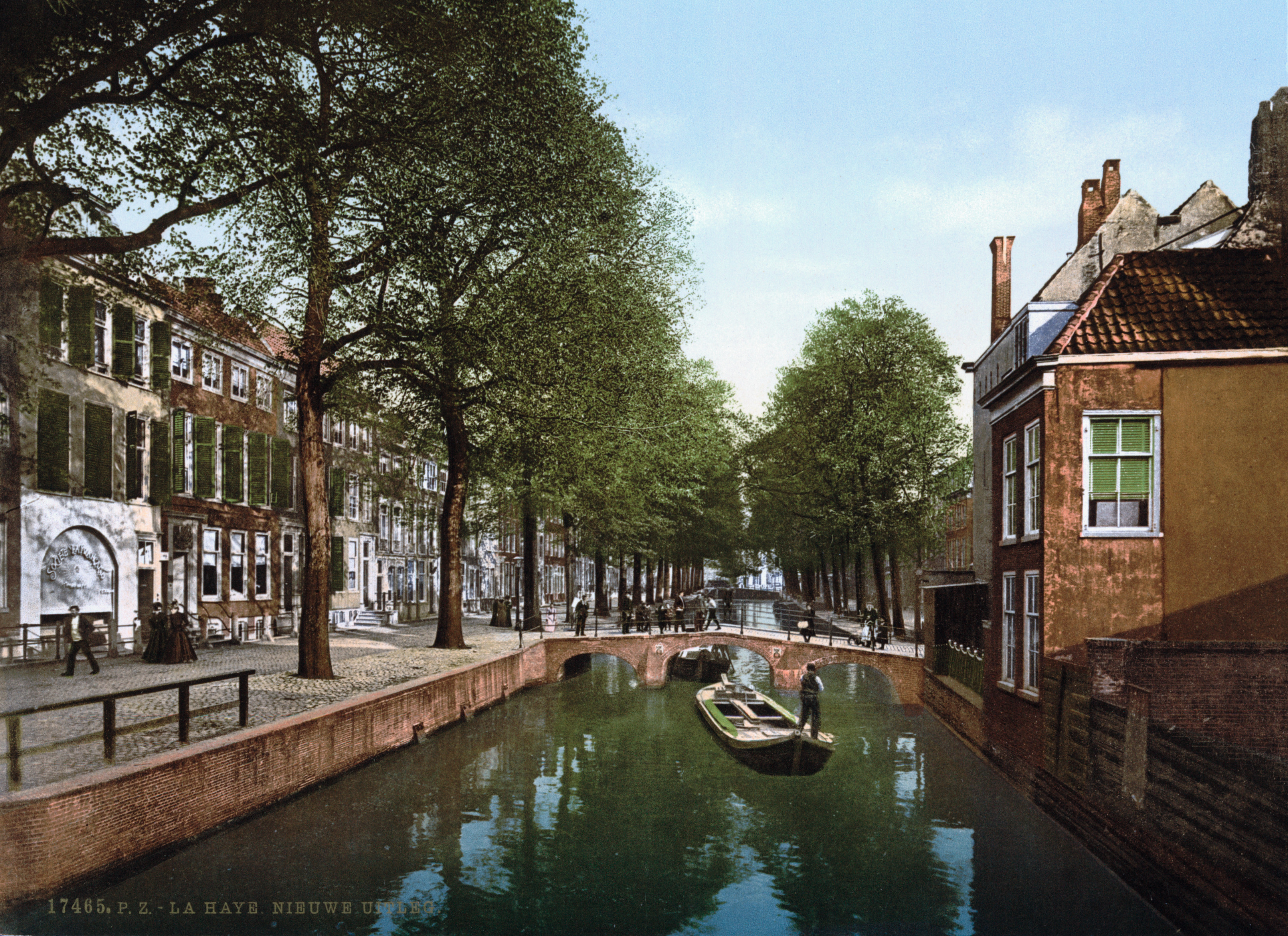 Den Haag - Nieuwe Uitleg